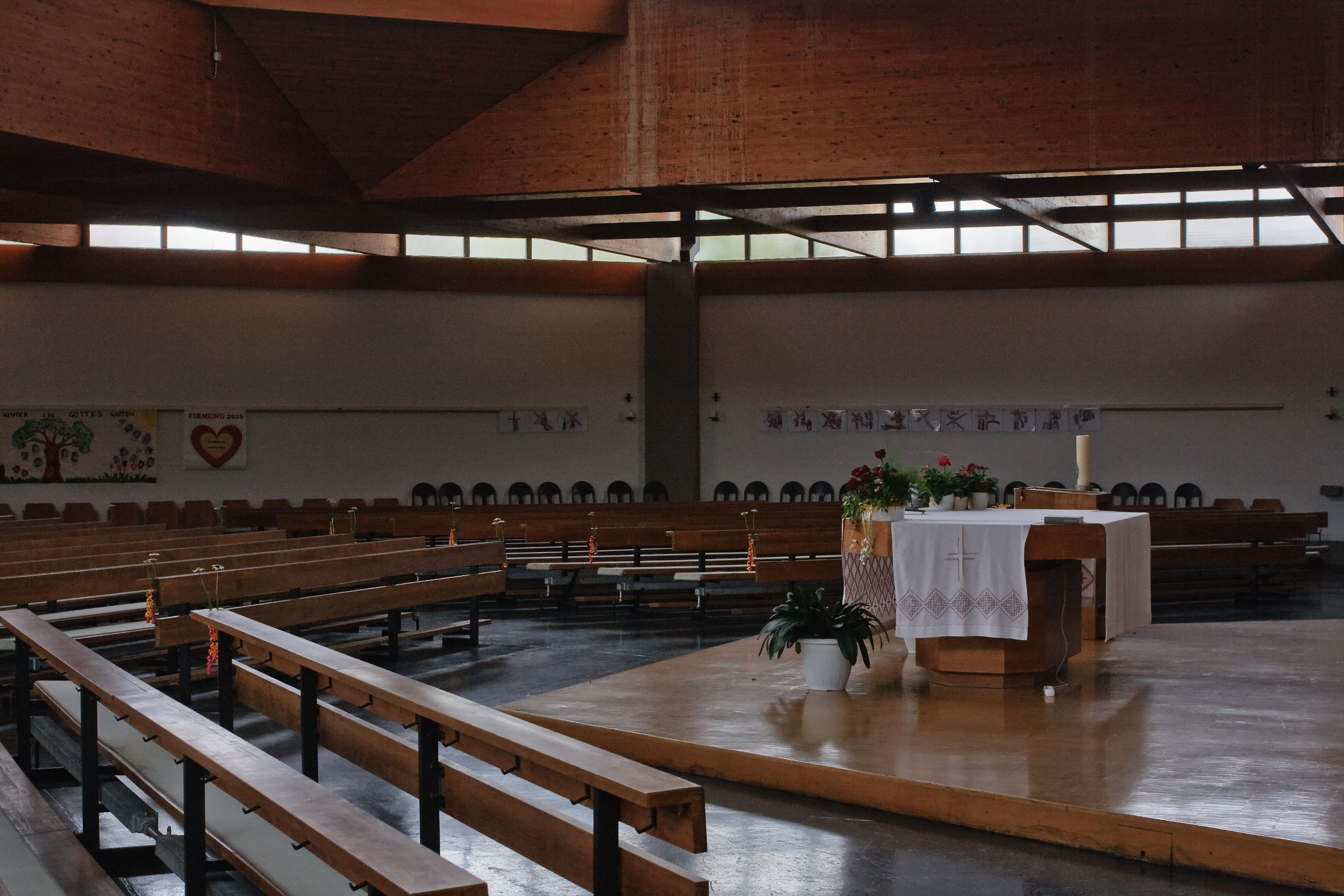 Die Pfarrkirche hl. Familie in Steyr-Tabor: Altarraum, Kirchenbänke und Teile der Dachkonstruktion